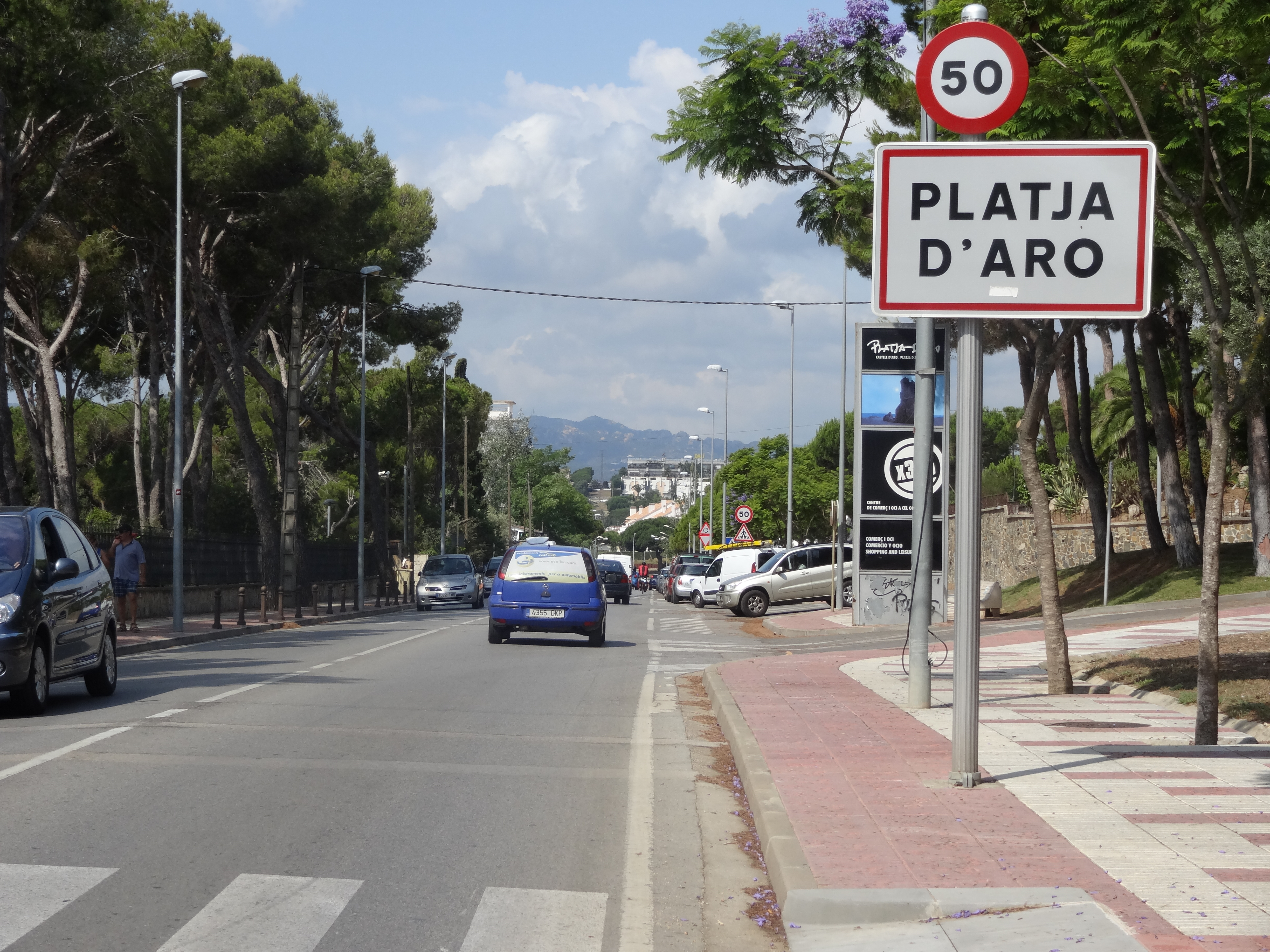 Castell-Platja d'Aro